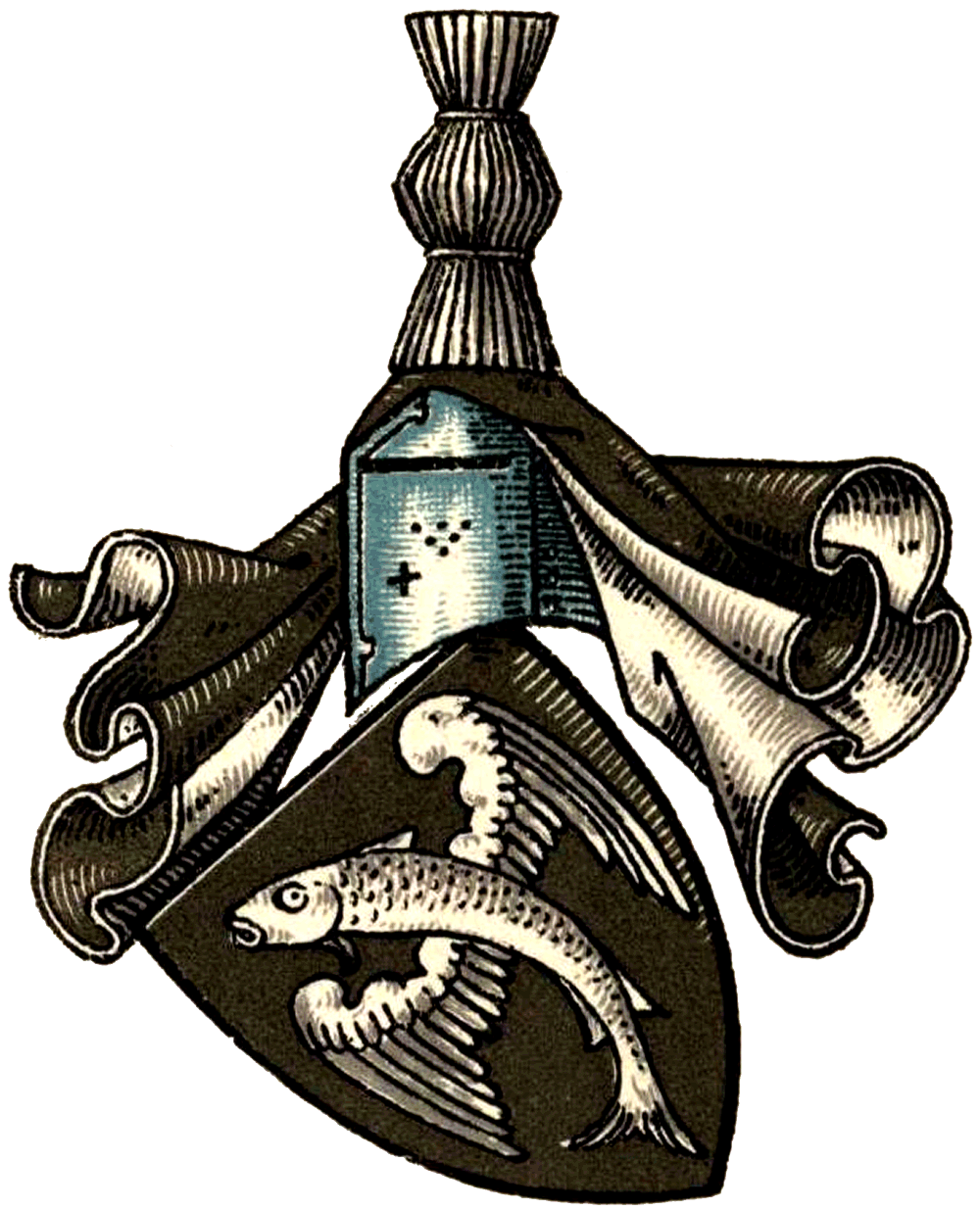 Wappen derer von Droste zu Hülshoff